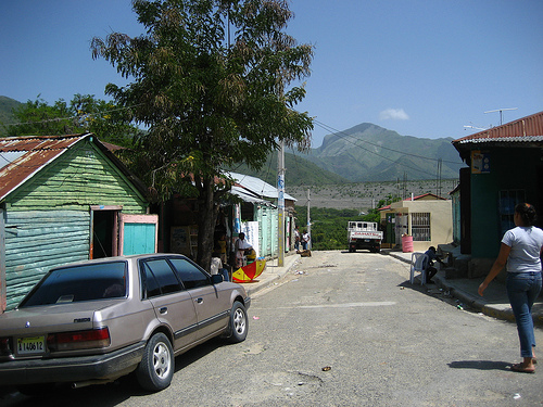 Republica Dominicana, Sabaneta